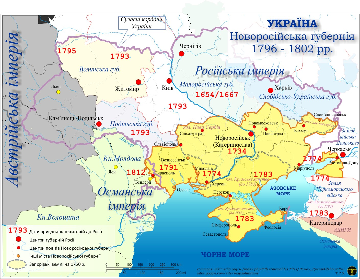 Новороссийская губерния в 1800 г.